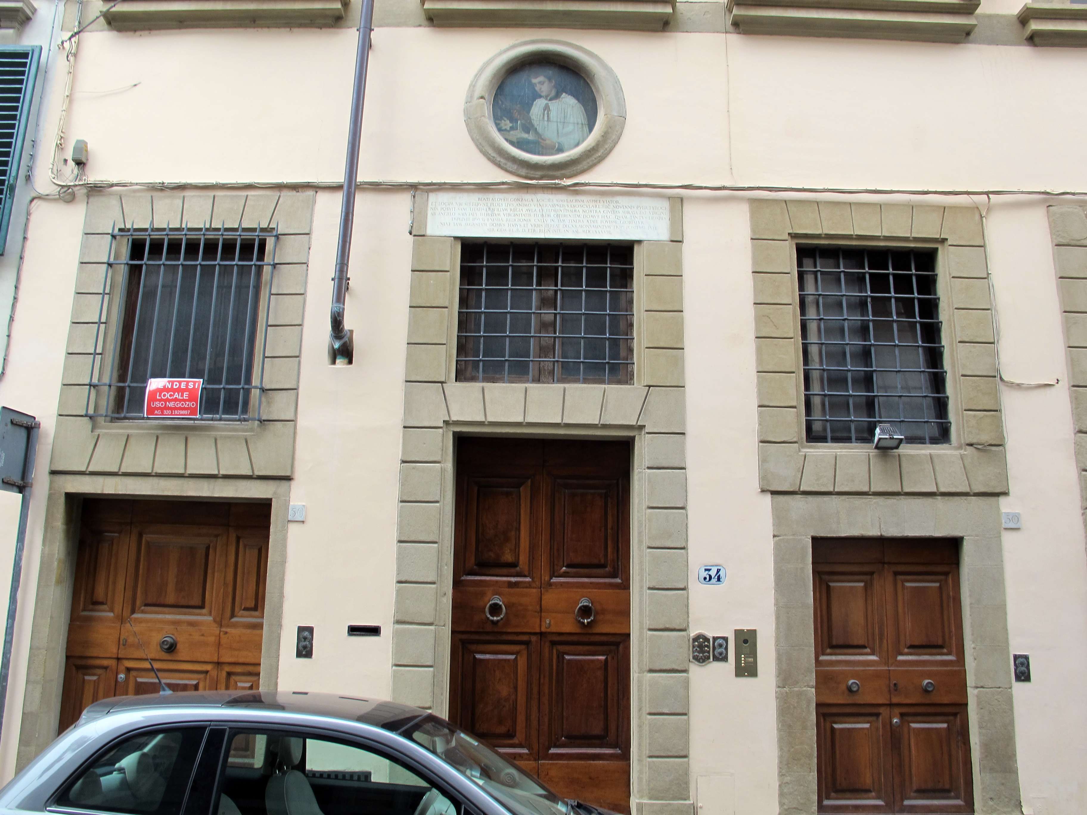 Via della Pergola, Firenze